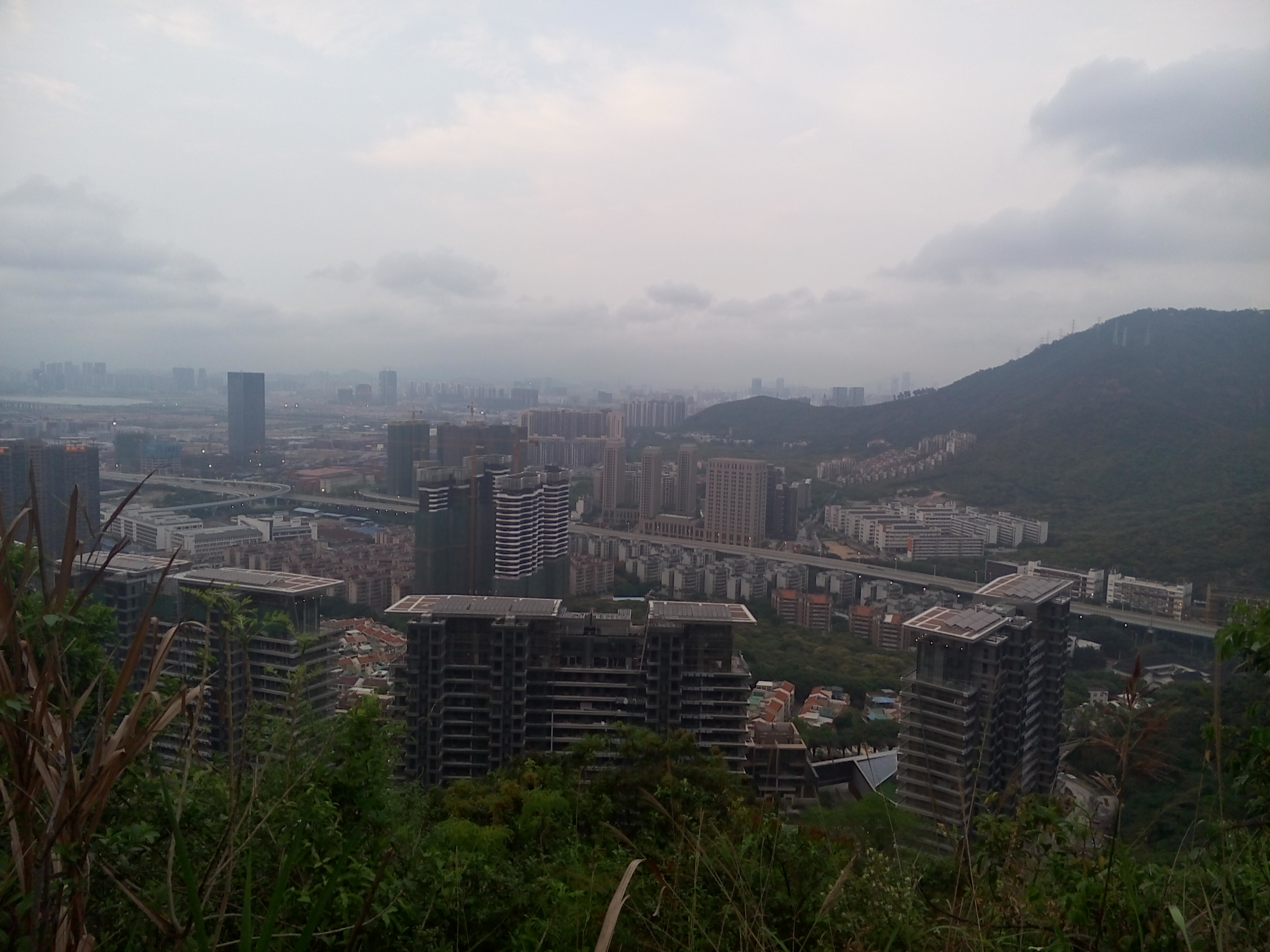 Shenzhen